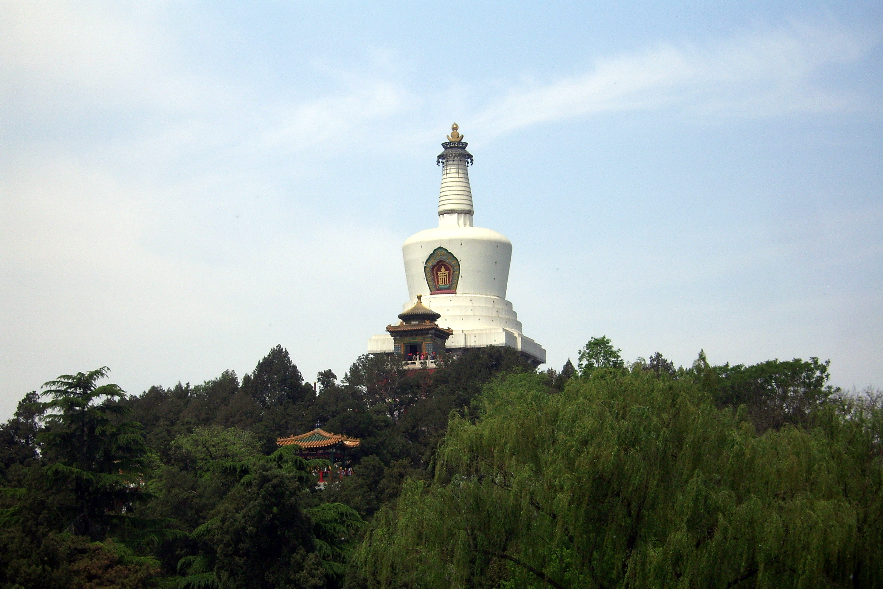 北海公园琼华岛